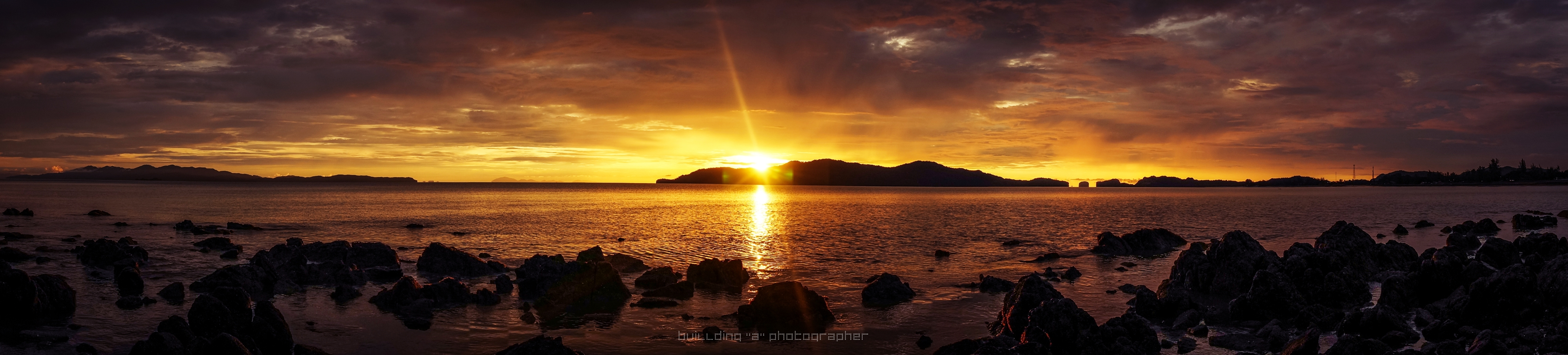 Petra 001